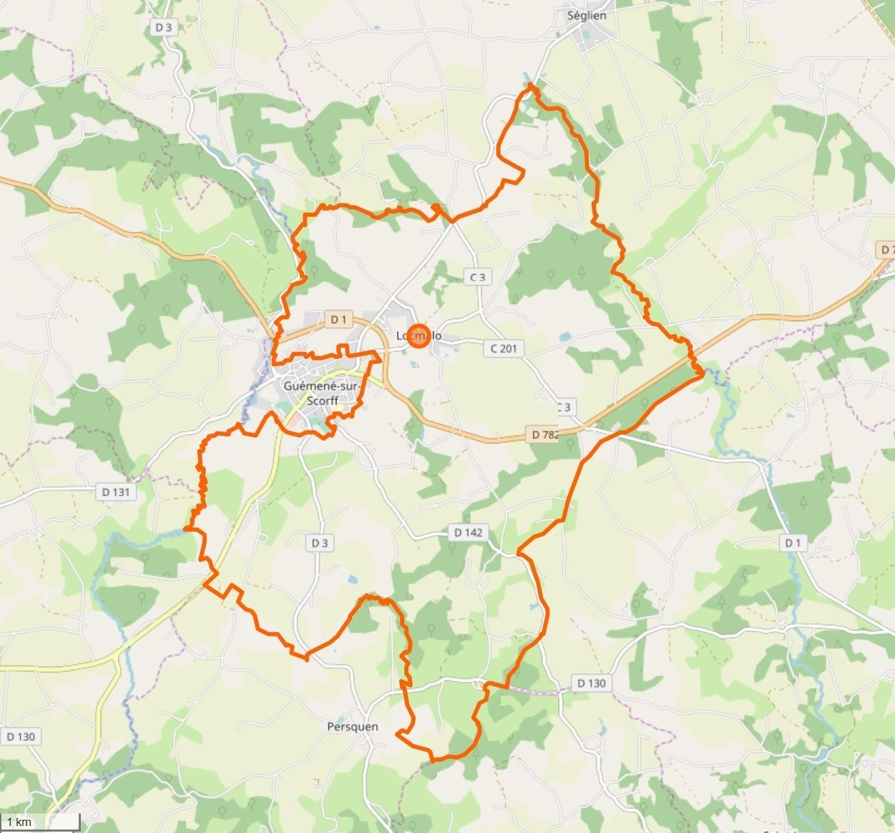 Cette carte a été créée à partir des données openstreetmap. This map may be incomplete, and may contain errors. Don't rely solely on it for navigation.